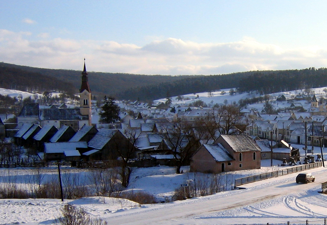 Ortsansicht von Dacia in Rumänien 2004, View on the village Dacia in Romania 2004 Photo: Lars Ulbricht